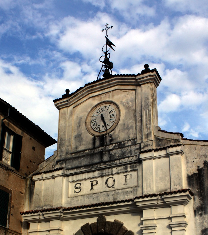 Prossedi, Piazza Umberto I: Portale con orologio pubblico.